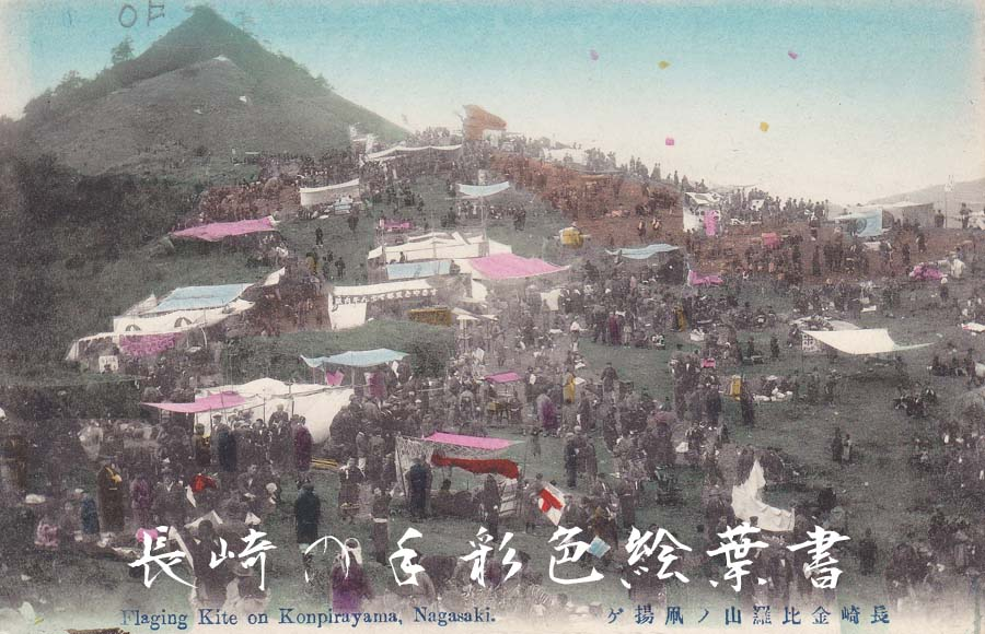 長崎金比羅山 ハタ揚げ